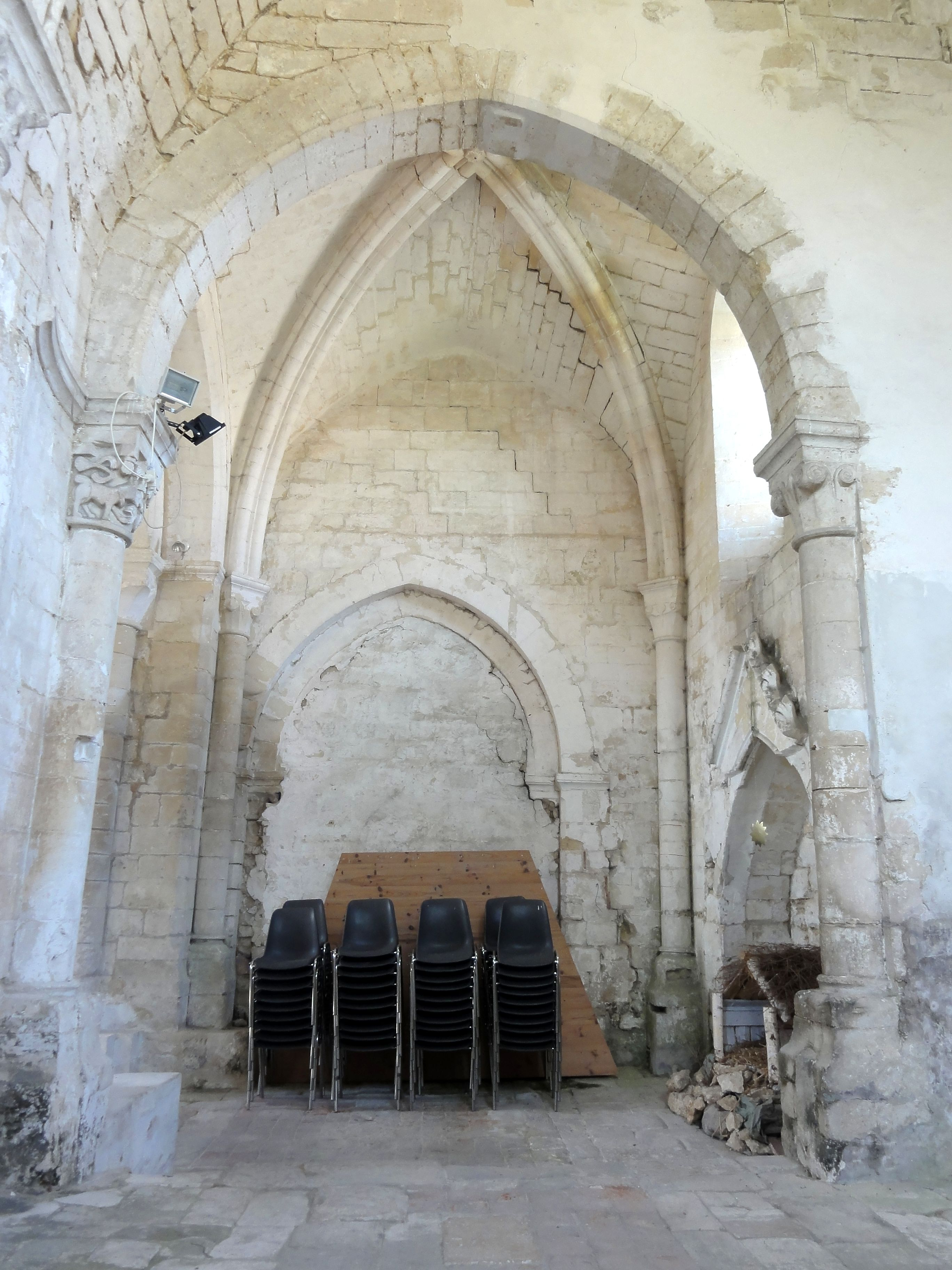 Chapelle nord, vue vers l'ouest.